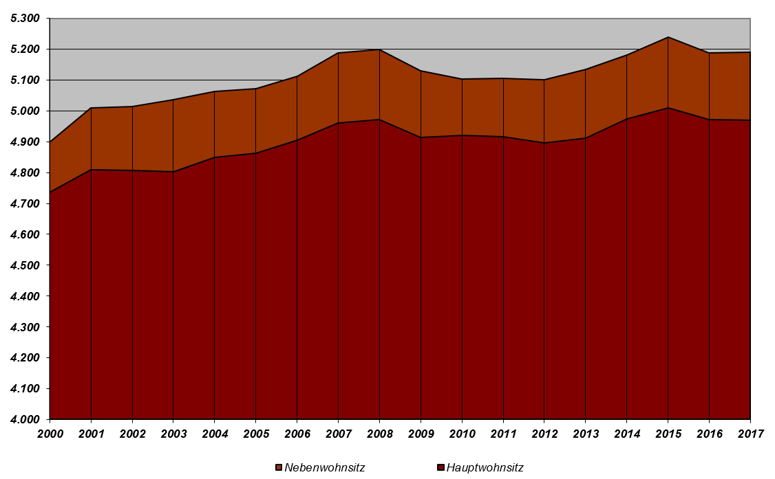 Grafik zur Einwohnerentwicklung Niedernbergs ab 2000